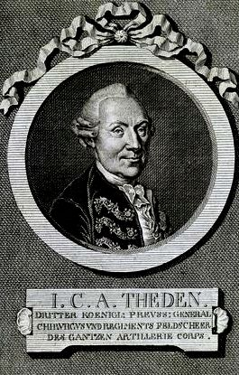 Porträt des Artzes Johann Christian Anton Theden